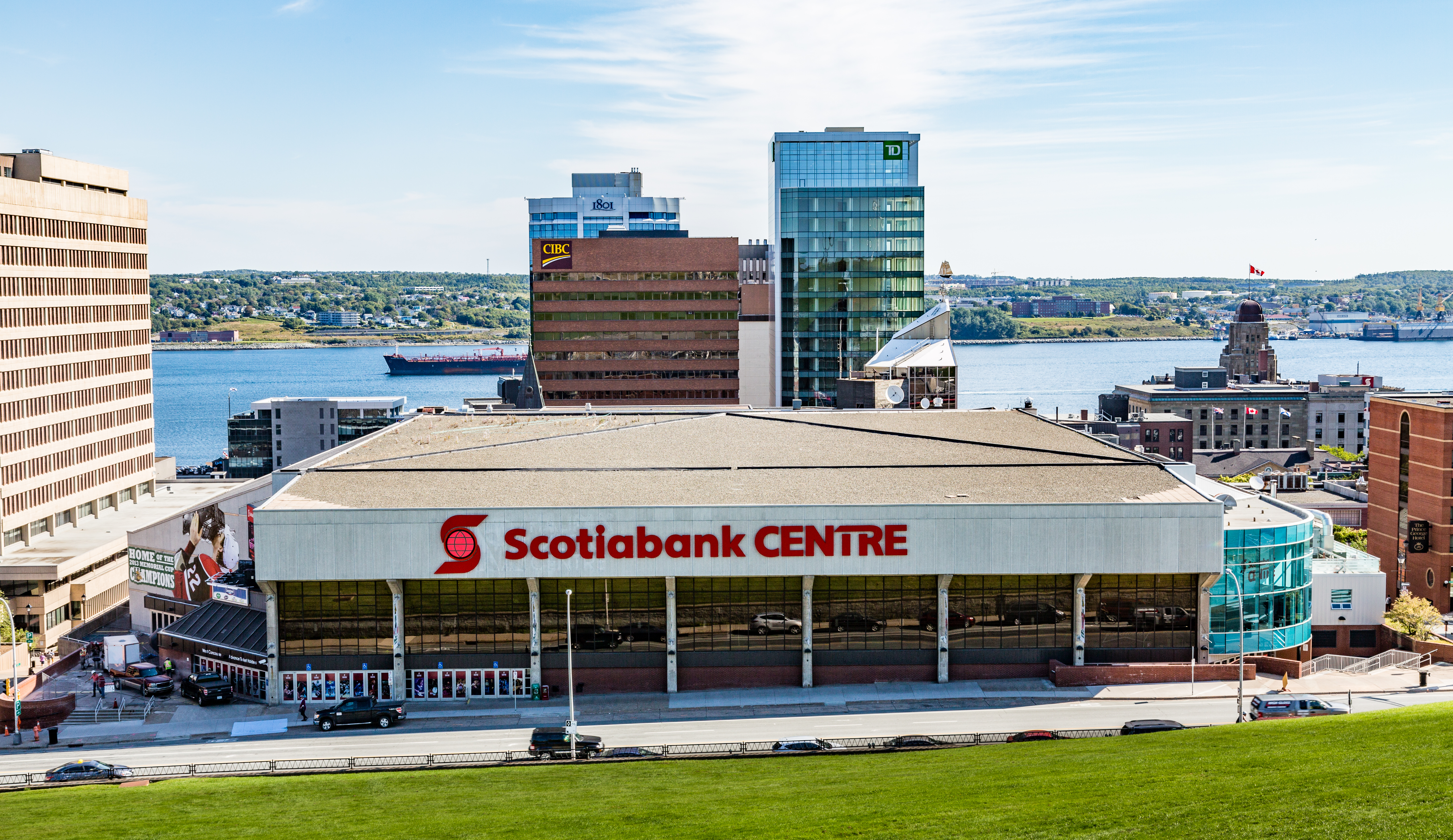 From Citadel Hill, Halifax, Nova Scotia, Canada